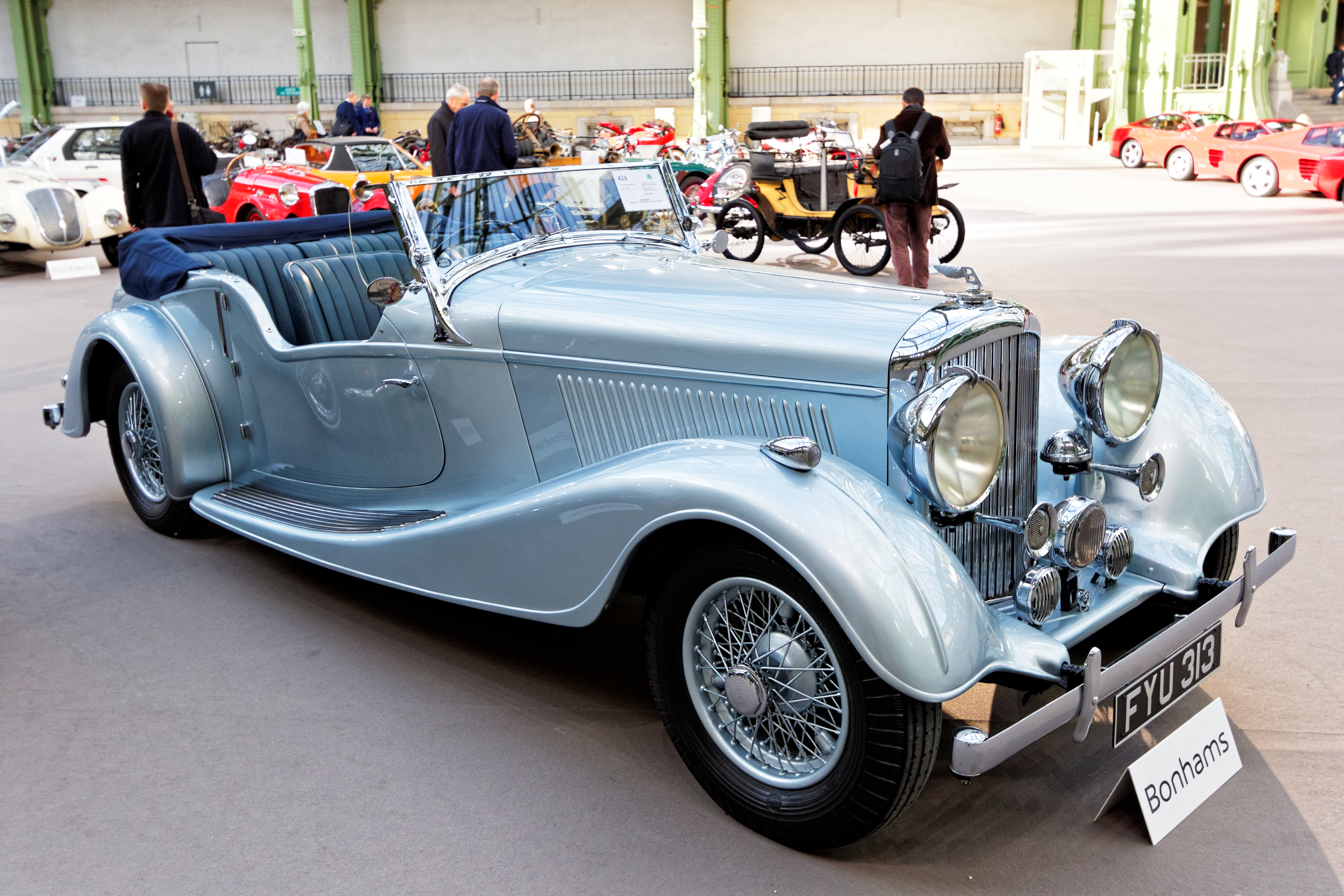 Un des véhicules présenté lors de la vente aux enchères Bonhams 2016 au Grand Palais de Paris.